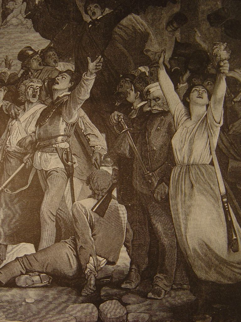 Le premier cri d'indépendance est une scène patriotique et la dernière production du peintre